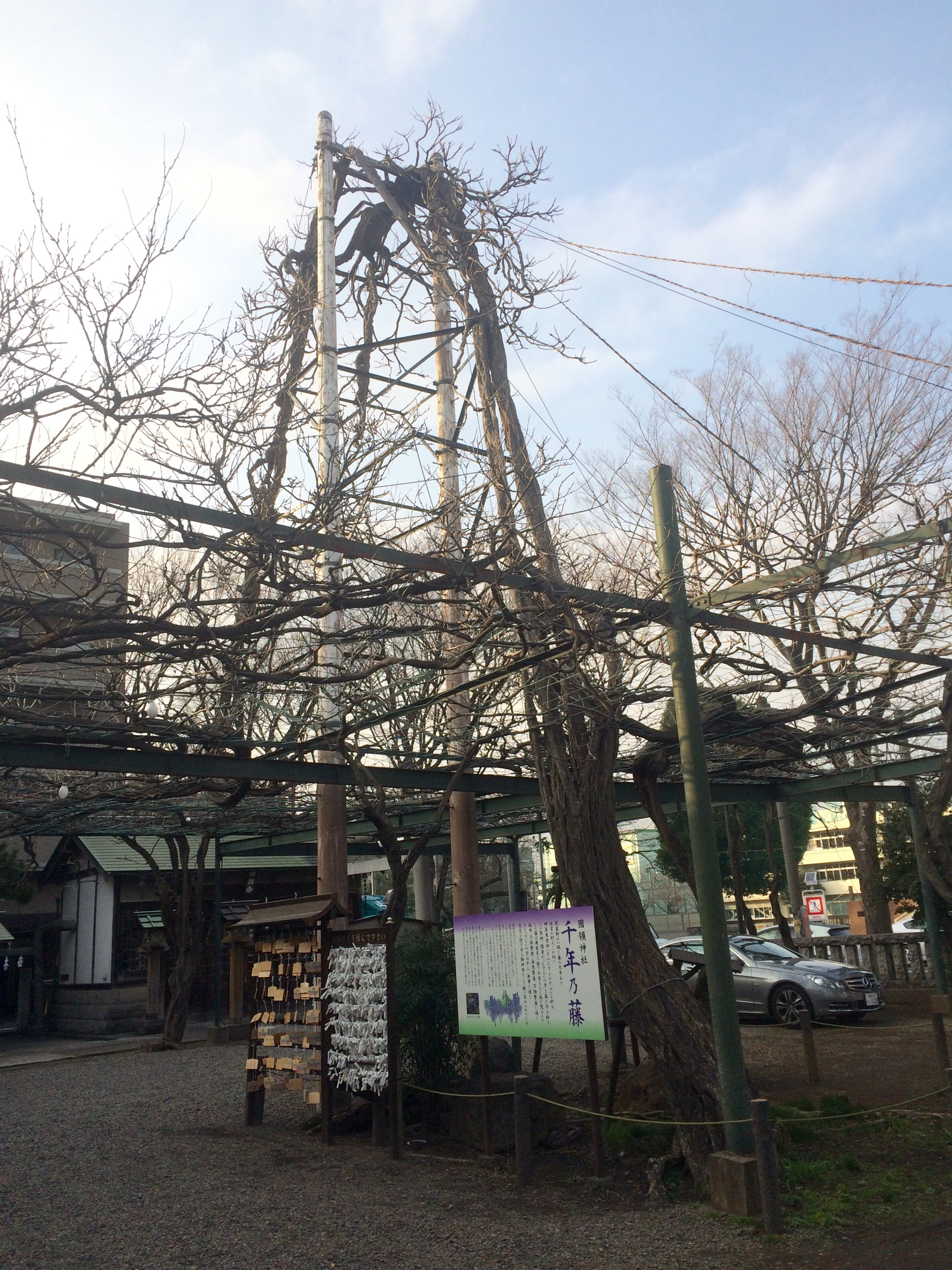 東京都調布市国領町の國領神社の境内にある「千年乃藤」（御神木）。かつては大きなケヤキに絡みついていたが落雷でケヤキが枯れ倒木の恐れが出てきたため、現在では電柱2本により支えている。